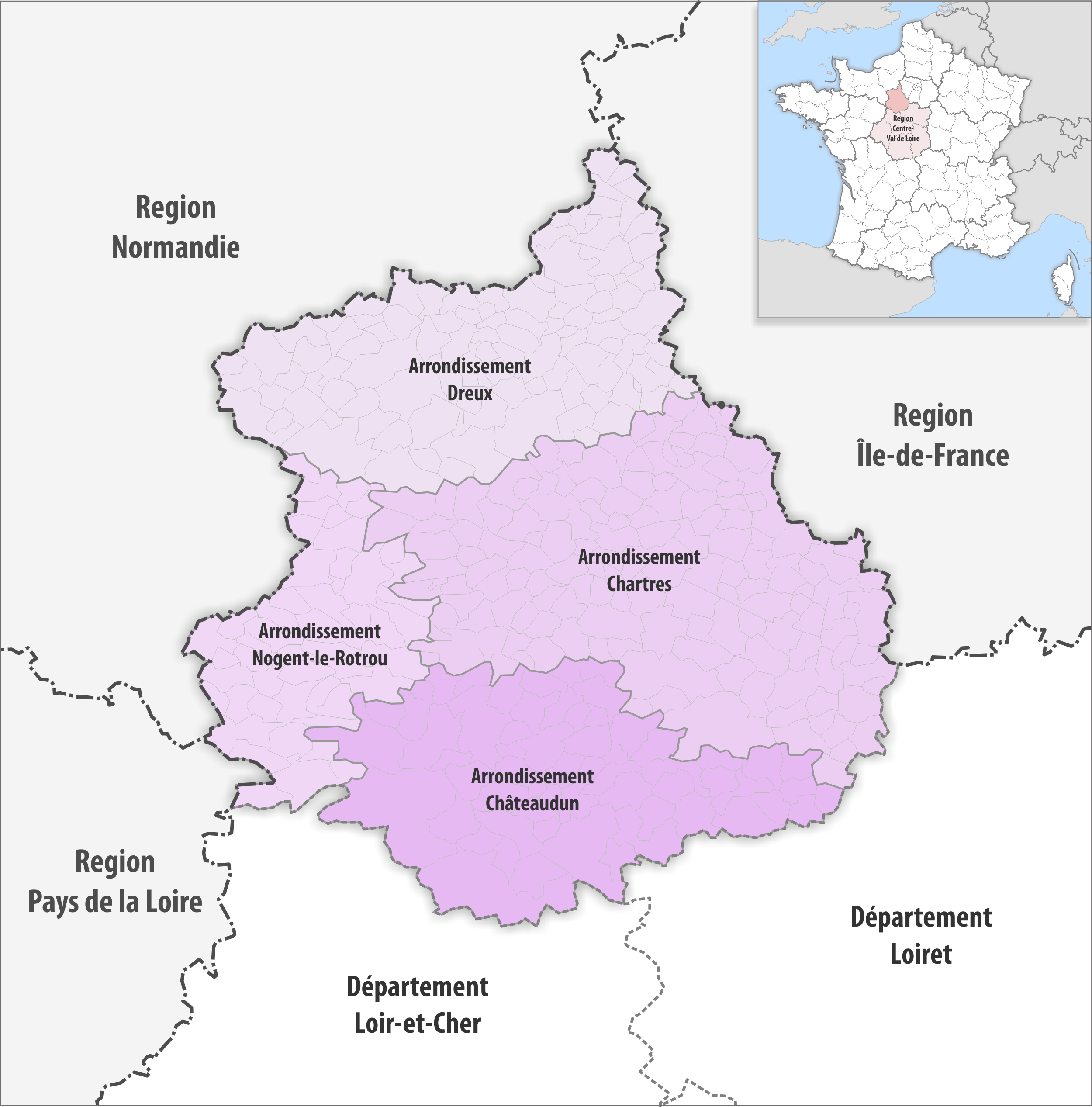 Gemeinden und Arrondissemente im Departement Eure-et-Loir